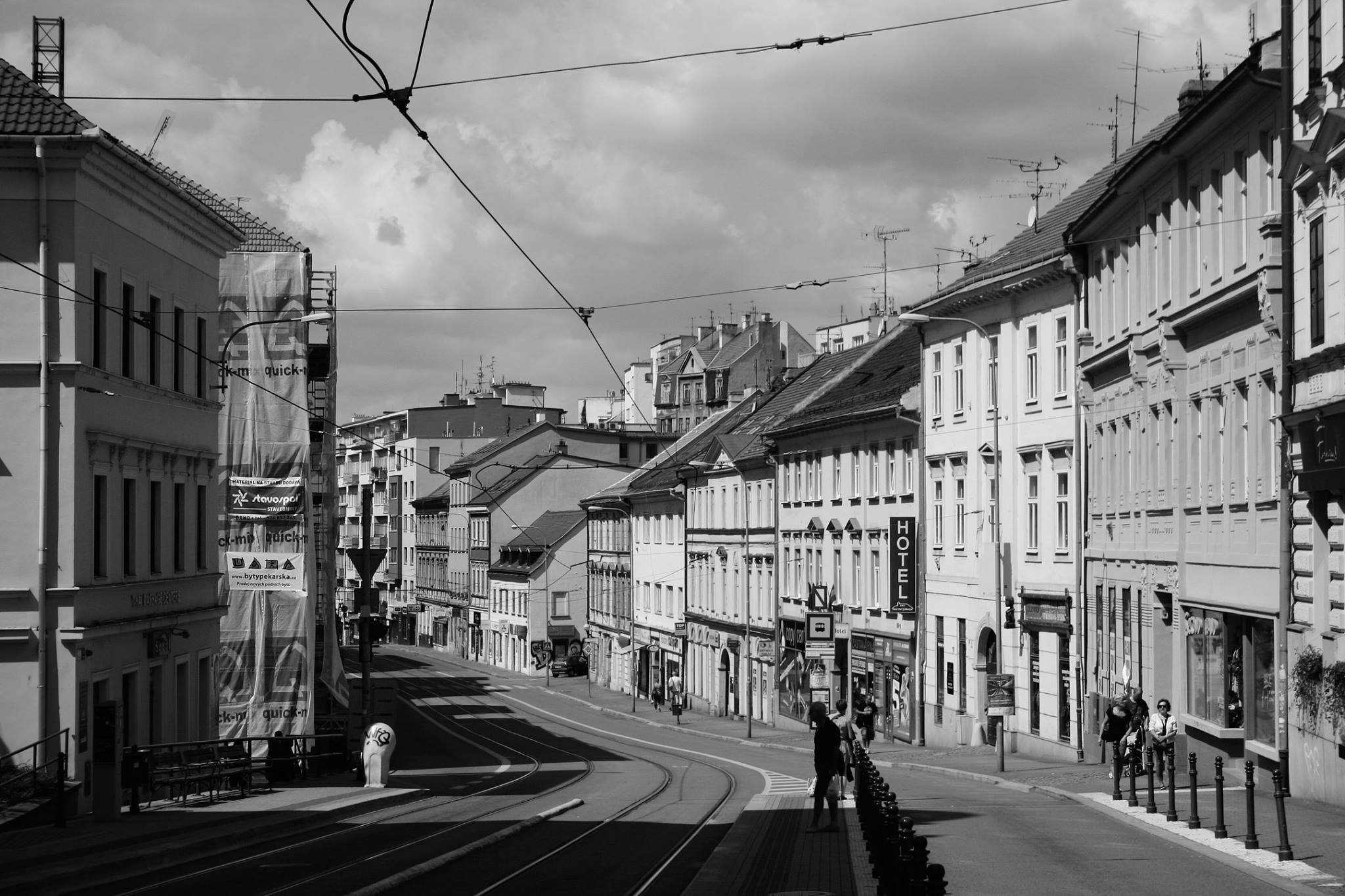 Brno Ulice Pekařská